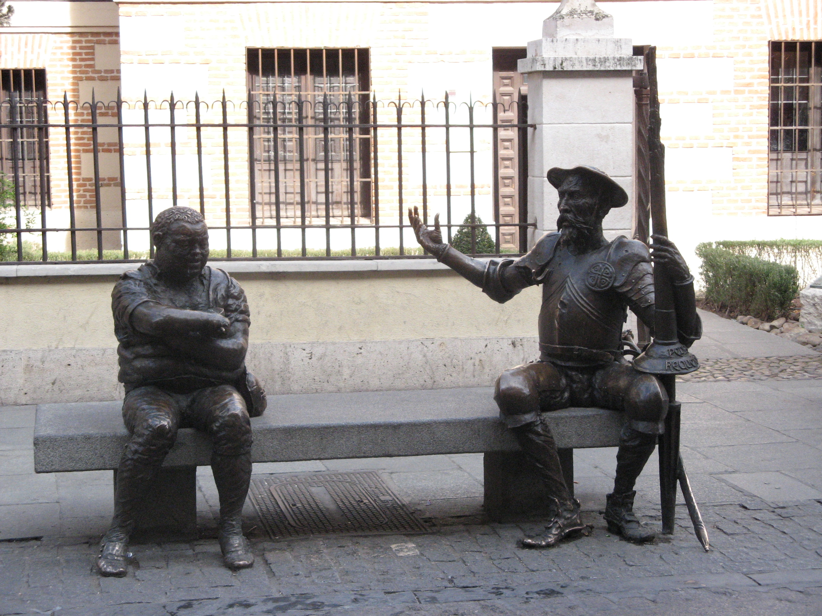 Don Quijote y Sancho Panza. Escultura en la Calle Mayor Alcalá de Henares, Madrid, España-Spain.